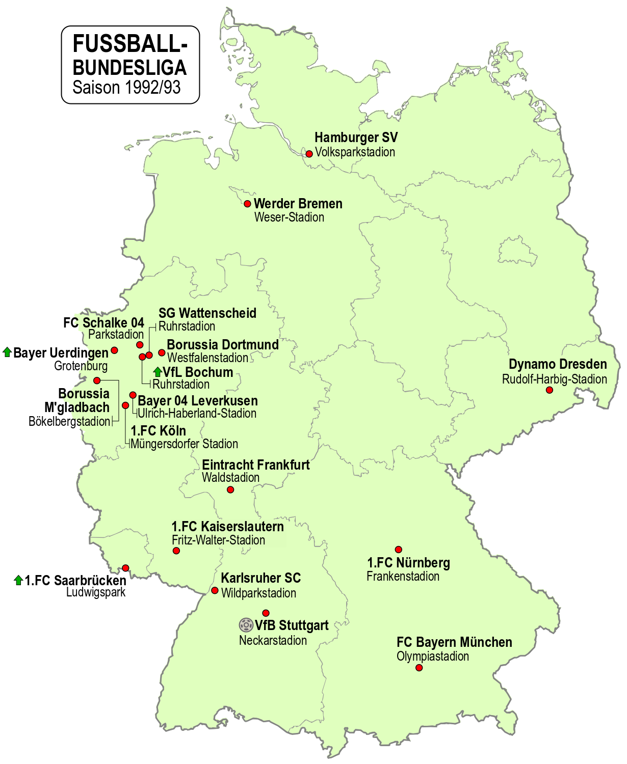 Karte der Vereine der Fussball-Bundesliga-Saison 1992/93